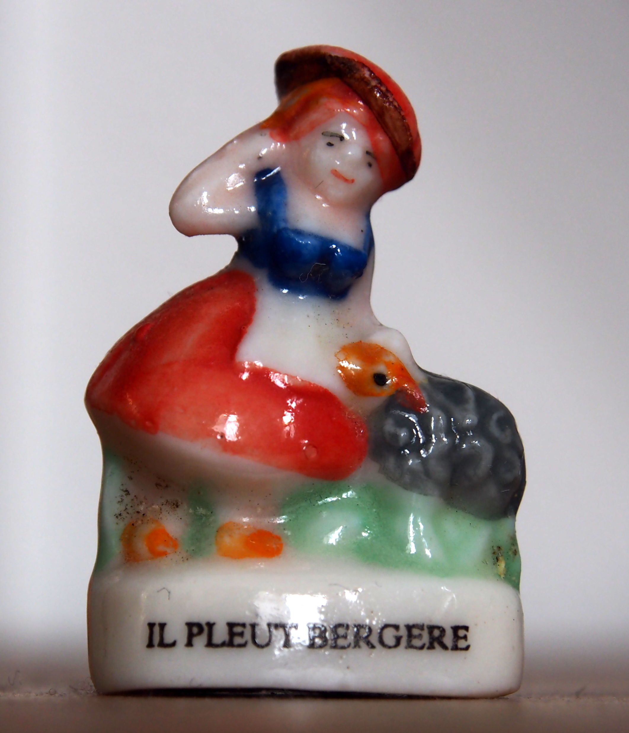 La Fève, une petite figurine.